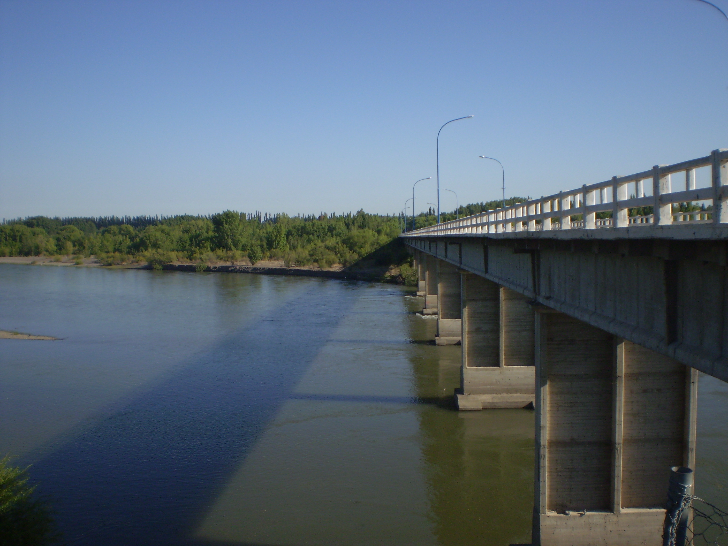 Puente sobre el Río Negro, (Paso Cordova) cercano a la ciudad de General Roca, Rio Negro, Argentina.